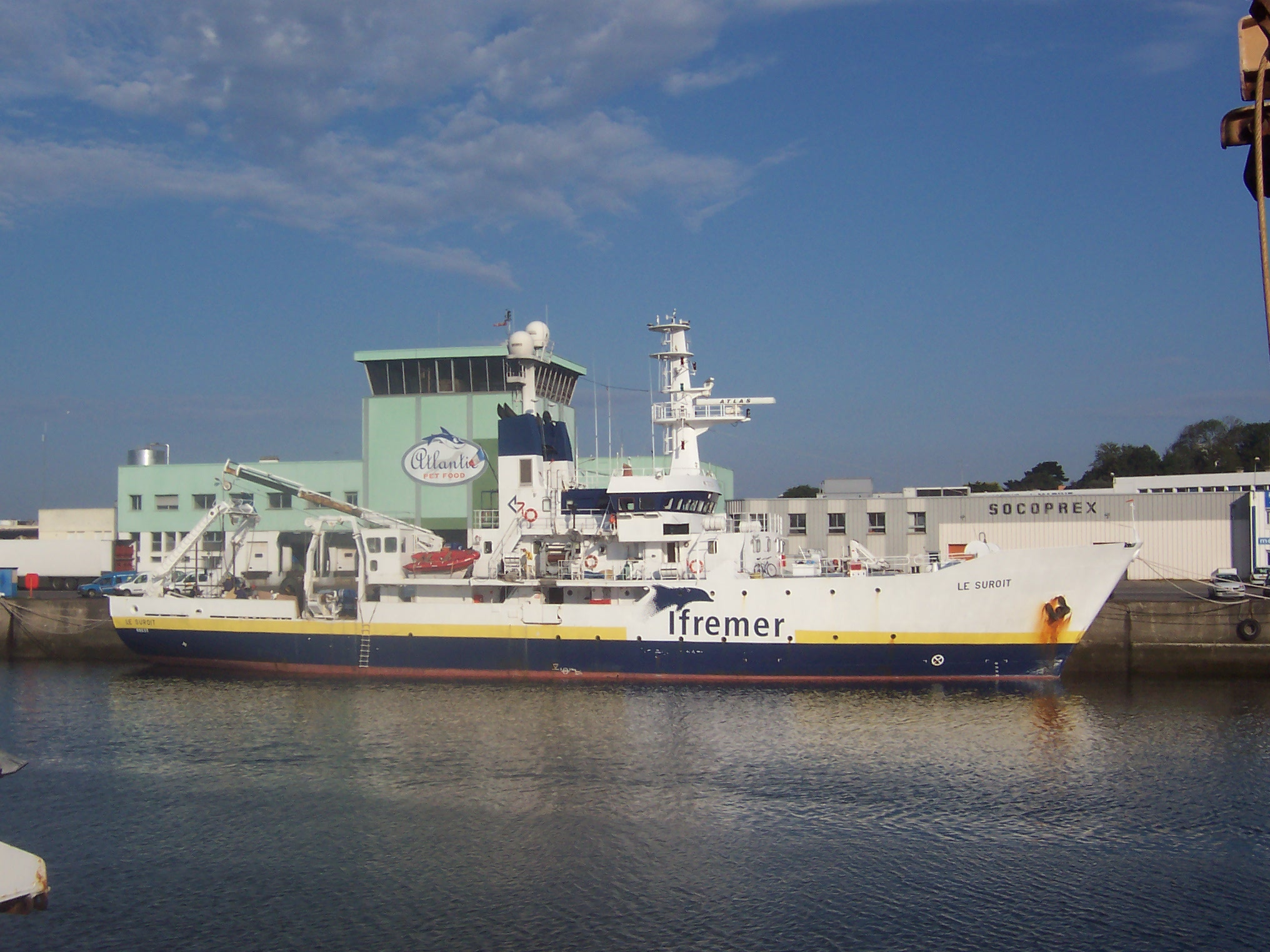 Le Suroît à quai à Concarneau (France) avant une mise en cale sèche IMO Number: 7360368 MMSI Number: 227223000 Callsign: FZVN Length: 56 m Beam: 11 m